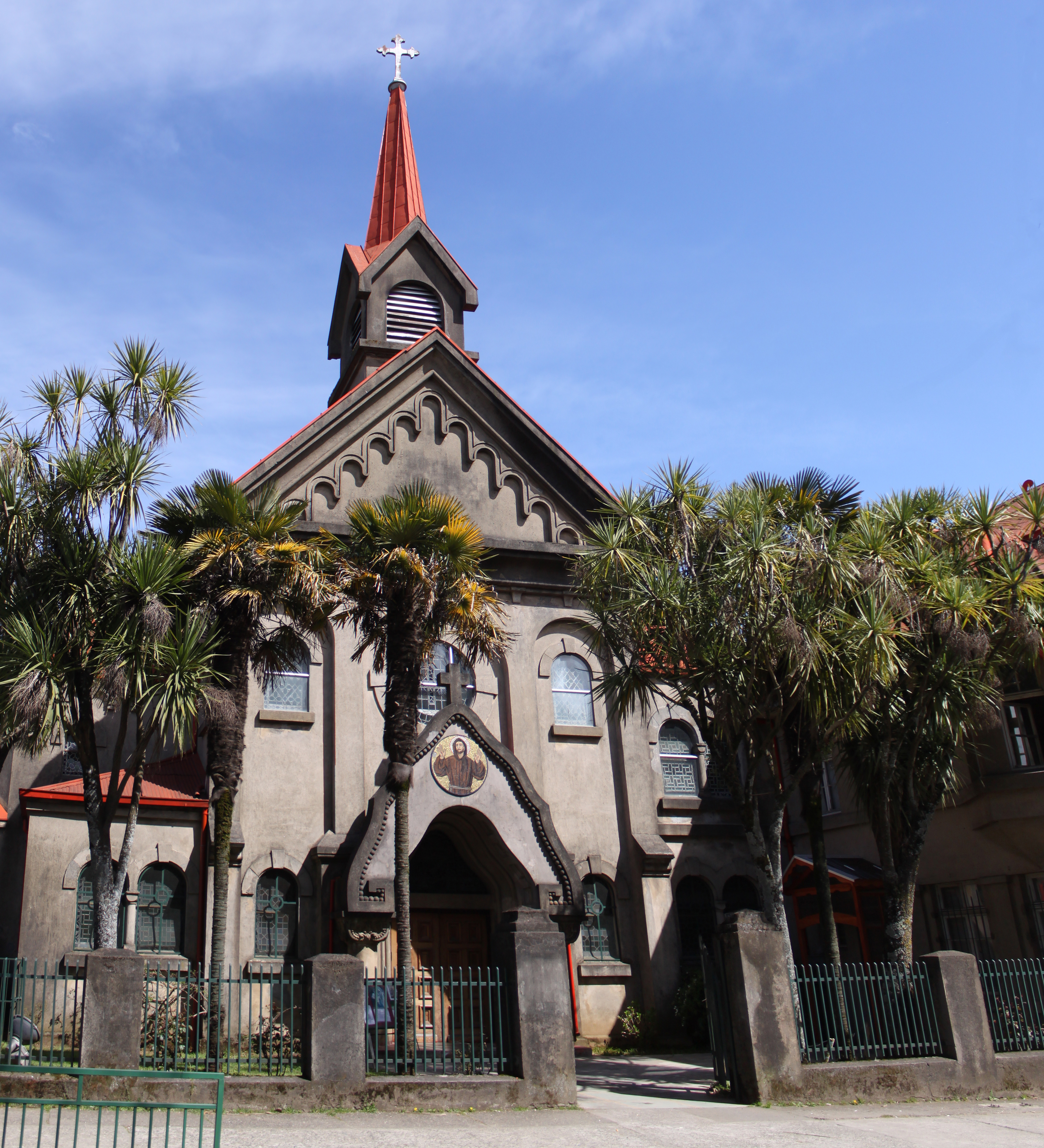 Iglesia San Francisco de Valdivia This is a photo of a national monument in Chile: 2005